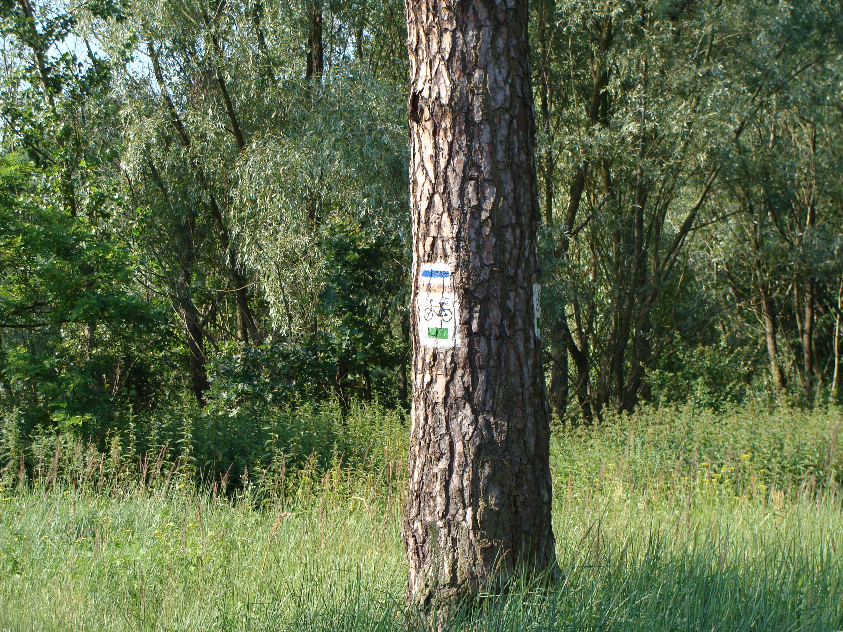 Łęg (woj. wielkopolskie, pow. śremski) - zielona trasa rowerowa, niebieska trasa piesza.